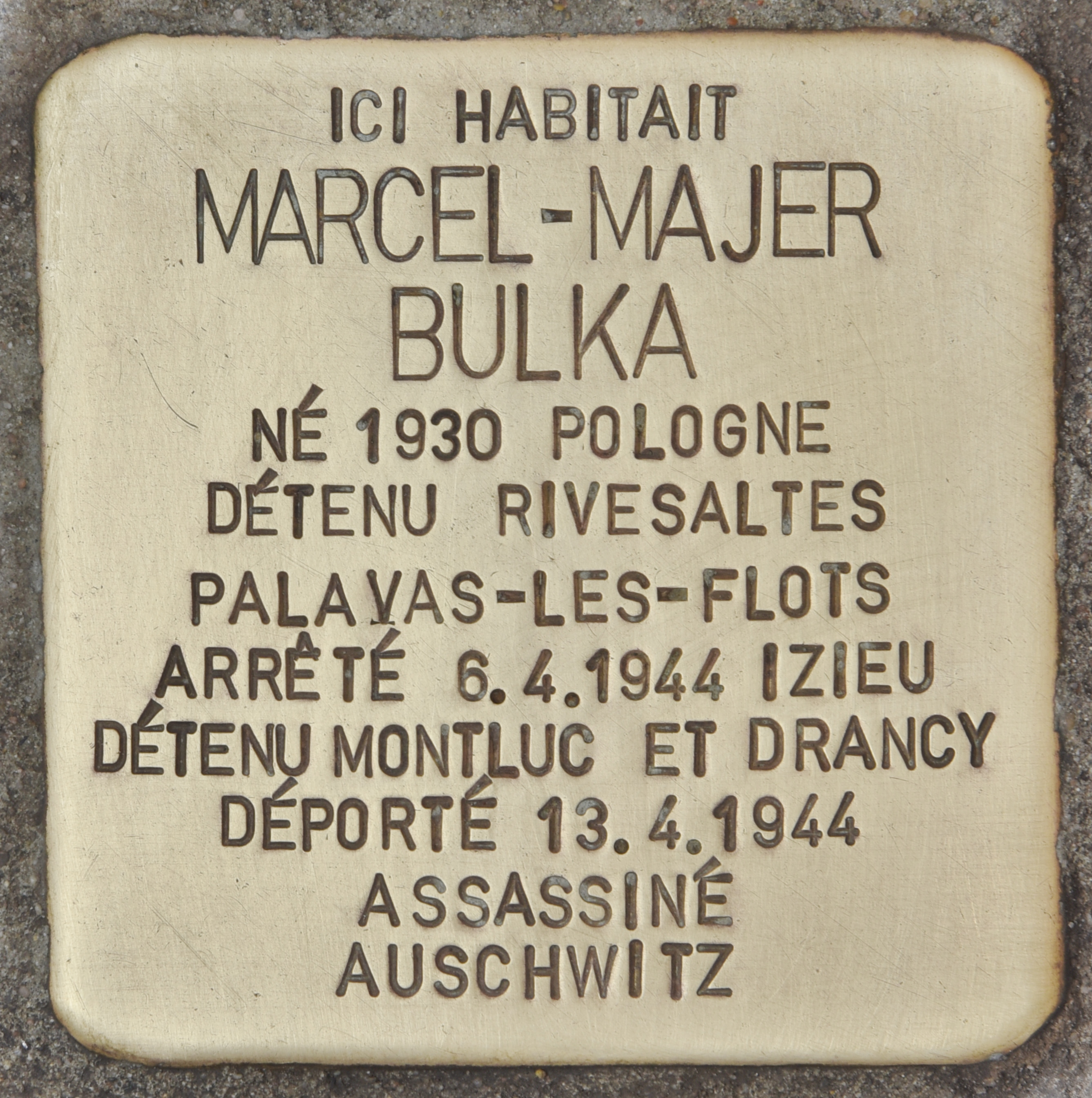 Stolperstein für Marcel-Majer Bulka